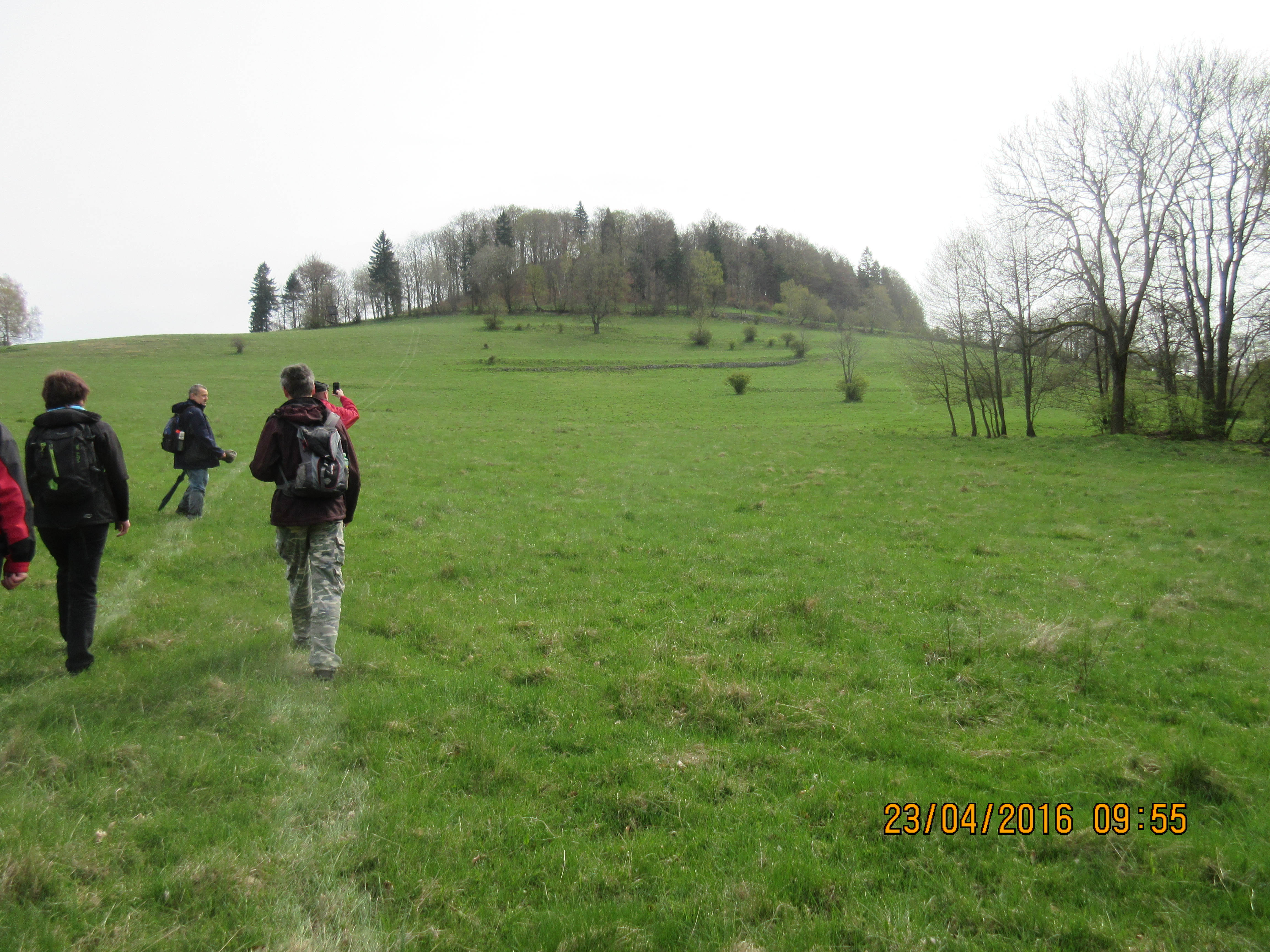 Ovčácký vrch z luk od Horního Prysku, výška 623 metrů nad mořem, asi Lužické hory